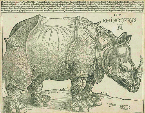 Albrecht Dürer, Rhinocerus, 1515, papier met houtsnede, 400 x 500 mm.